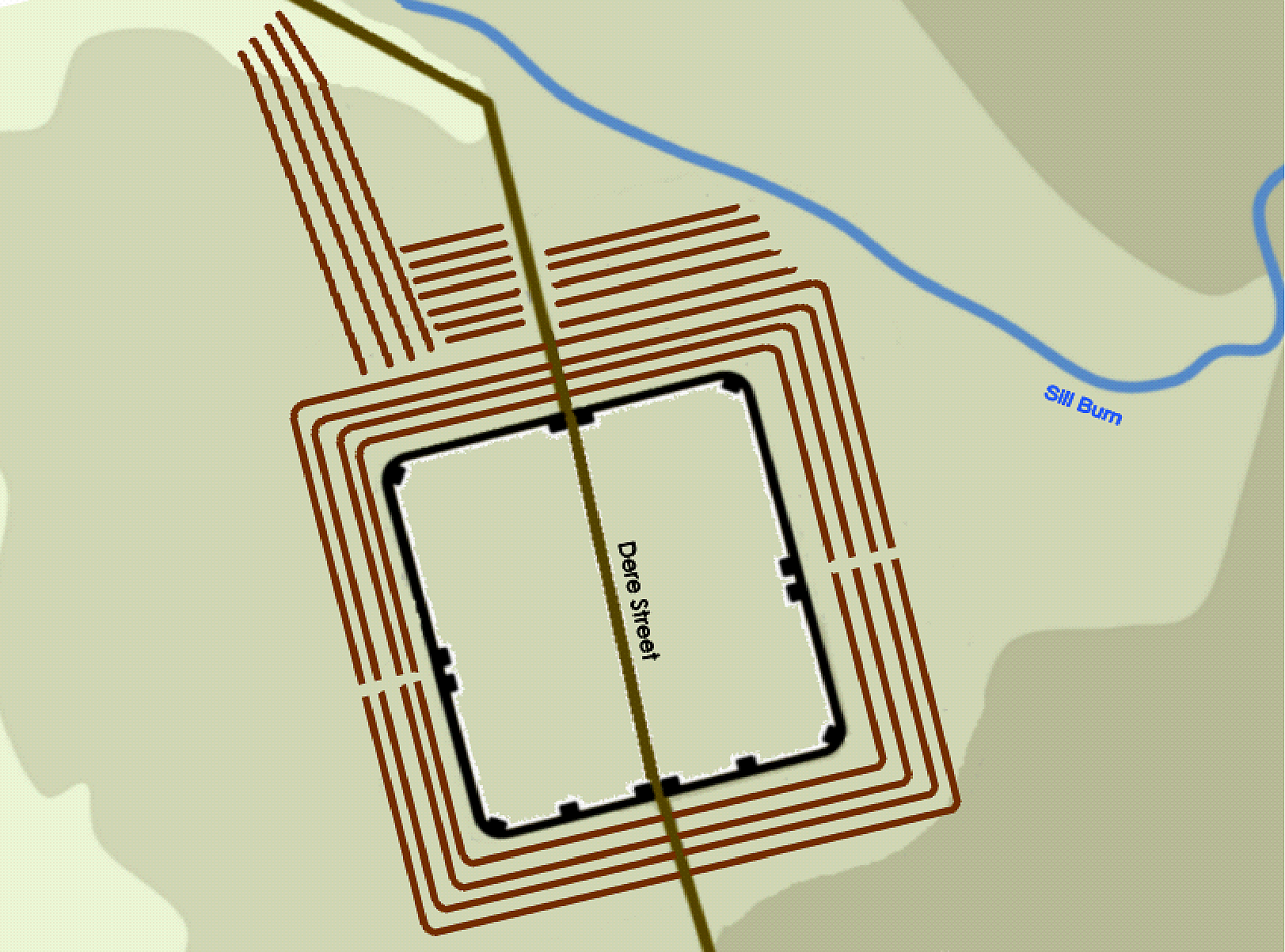 Skizze des Wehrgrabensystems des Kastells Bremenium, High Rochester (GB).